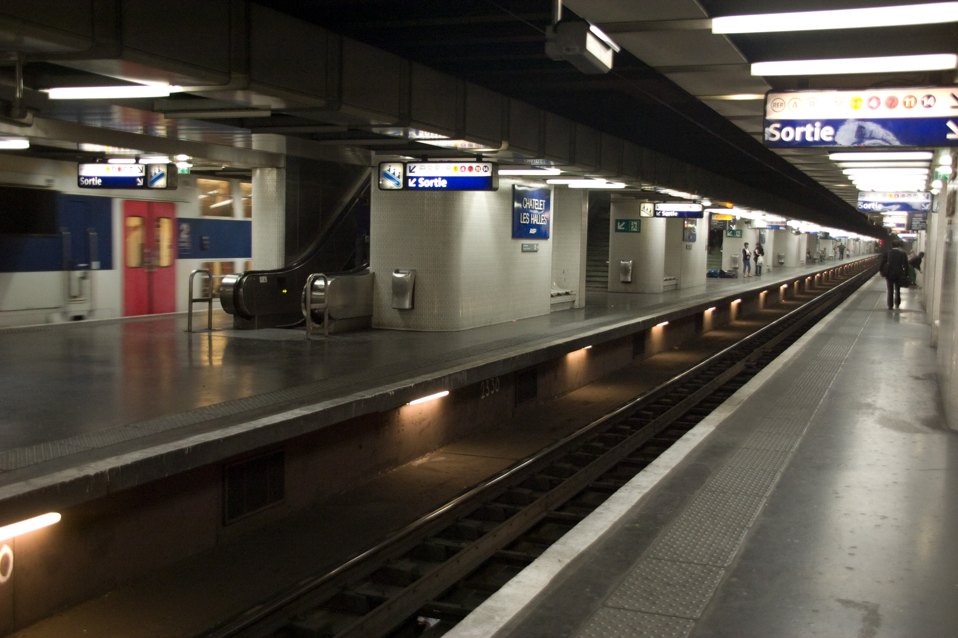 Station Châtelet - Les Halles, Paris, France